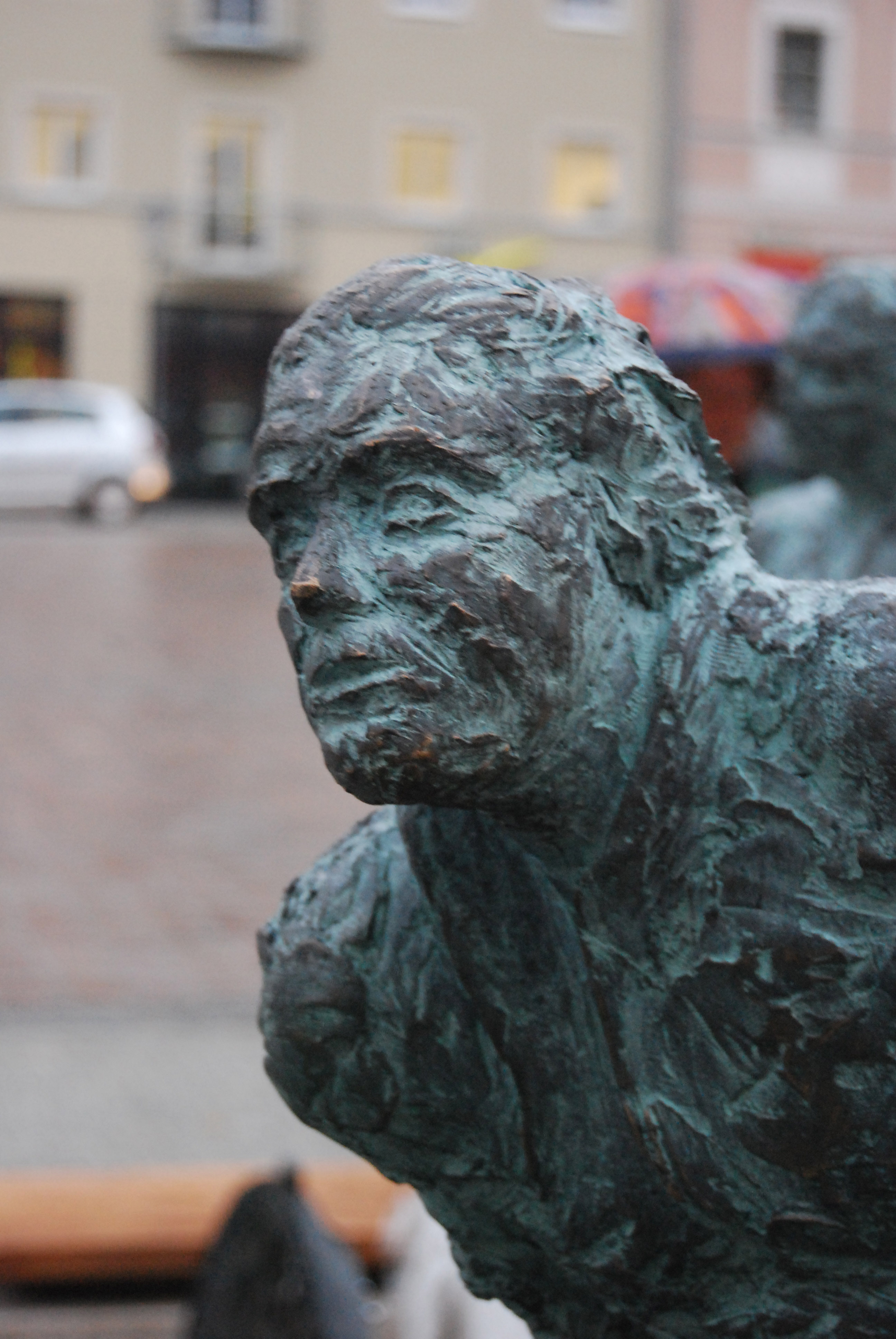 Bronze-Figur aus dem Ensemble